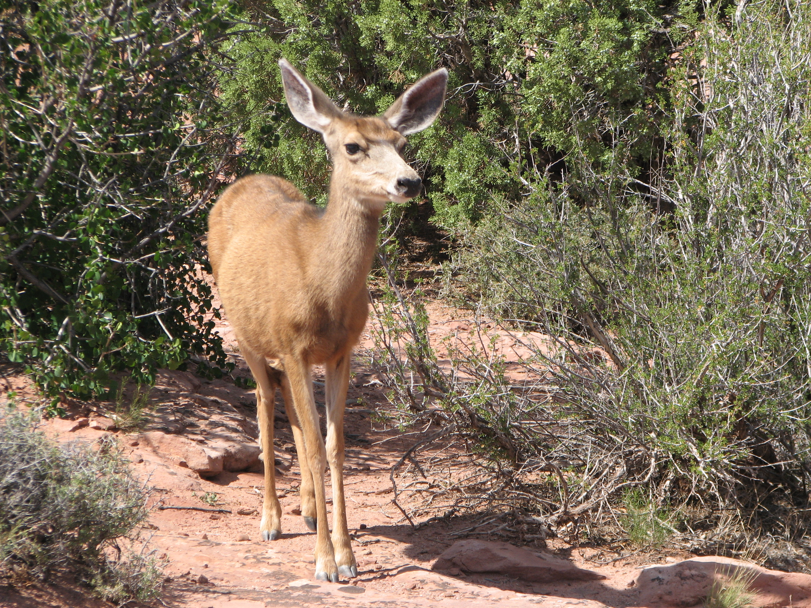 Odocoileus hemionus